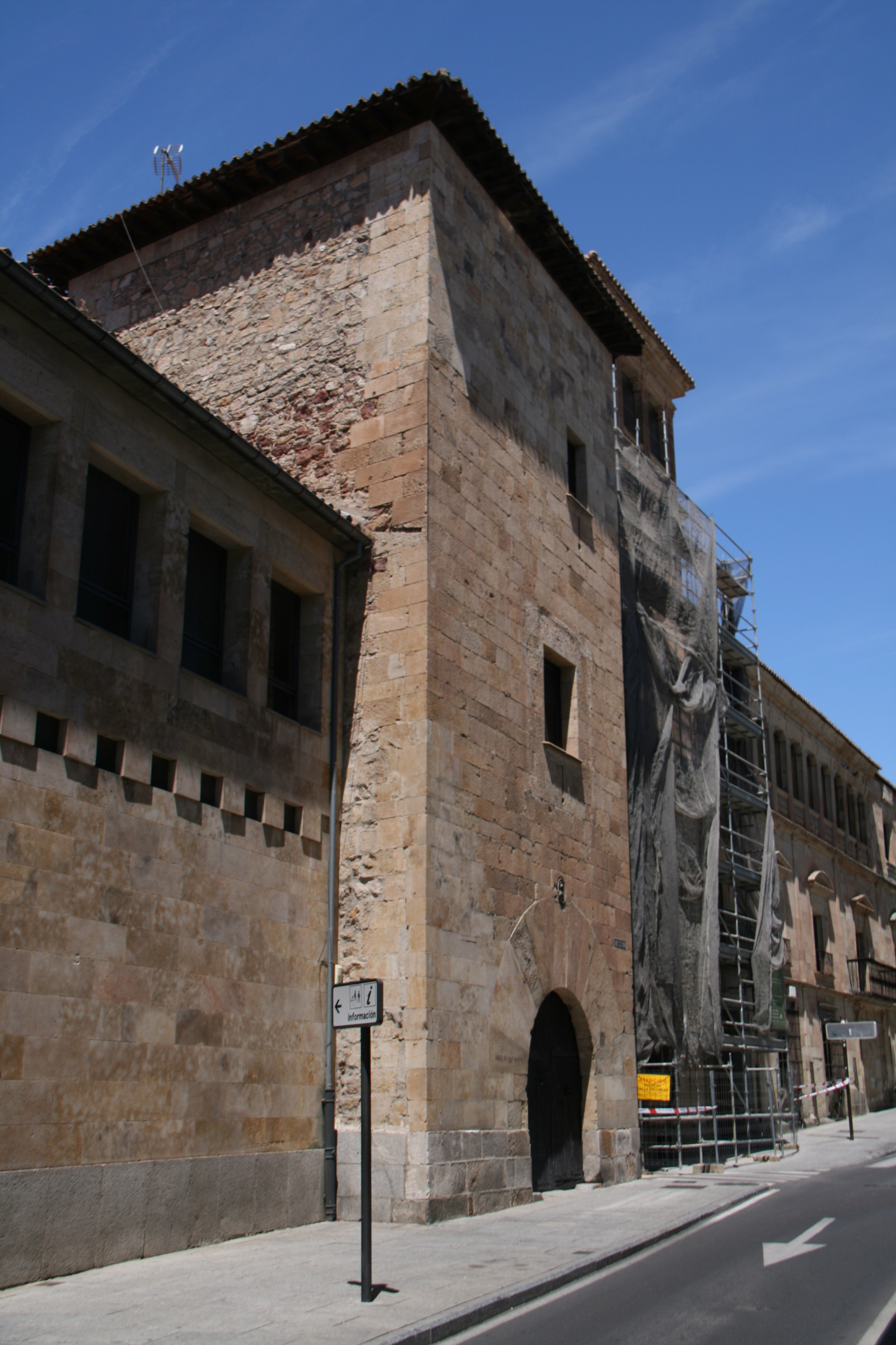 Torre de los Anaya - Salamanca